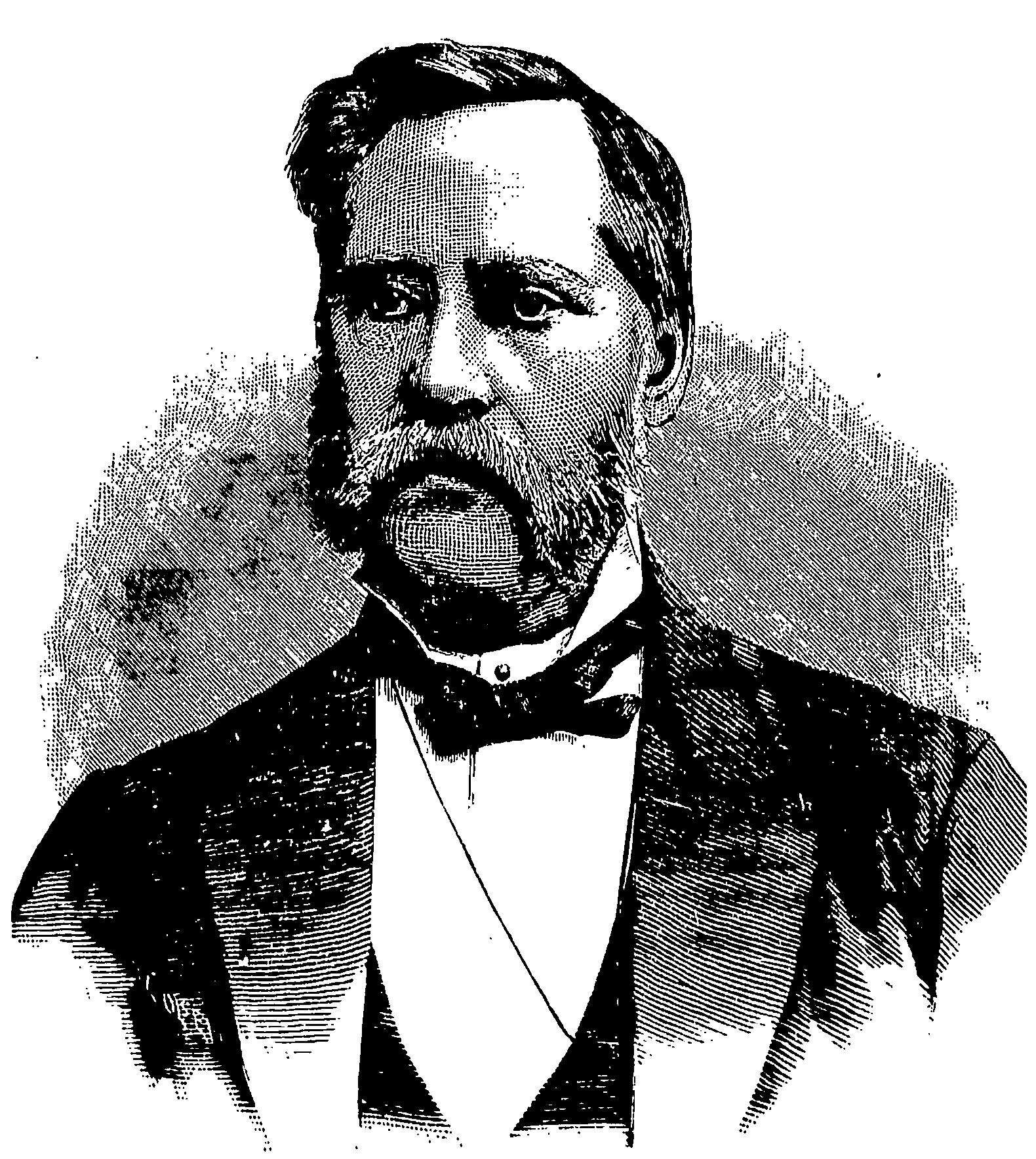 Lagtingspresident Christian Møinichen Havig.